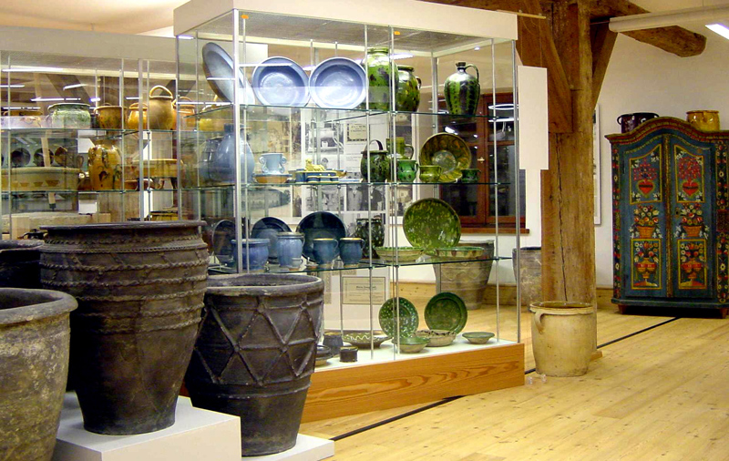 Ein Blick in die Schwerpunktausstellung mit Kröninger Hafnerkeramik, in der rund 900 Exponate zu sehen sind.